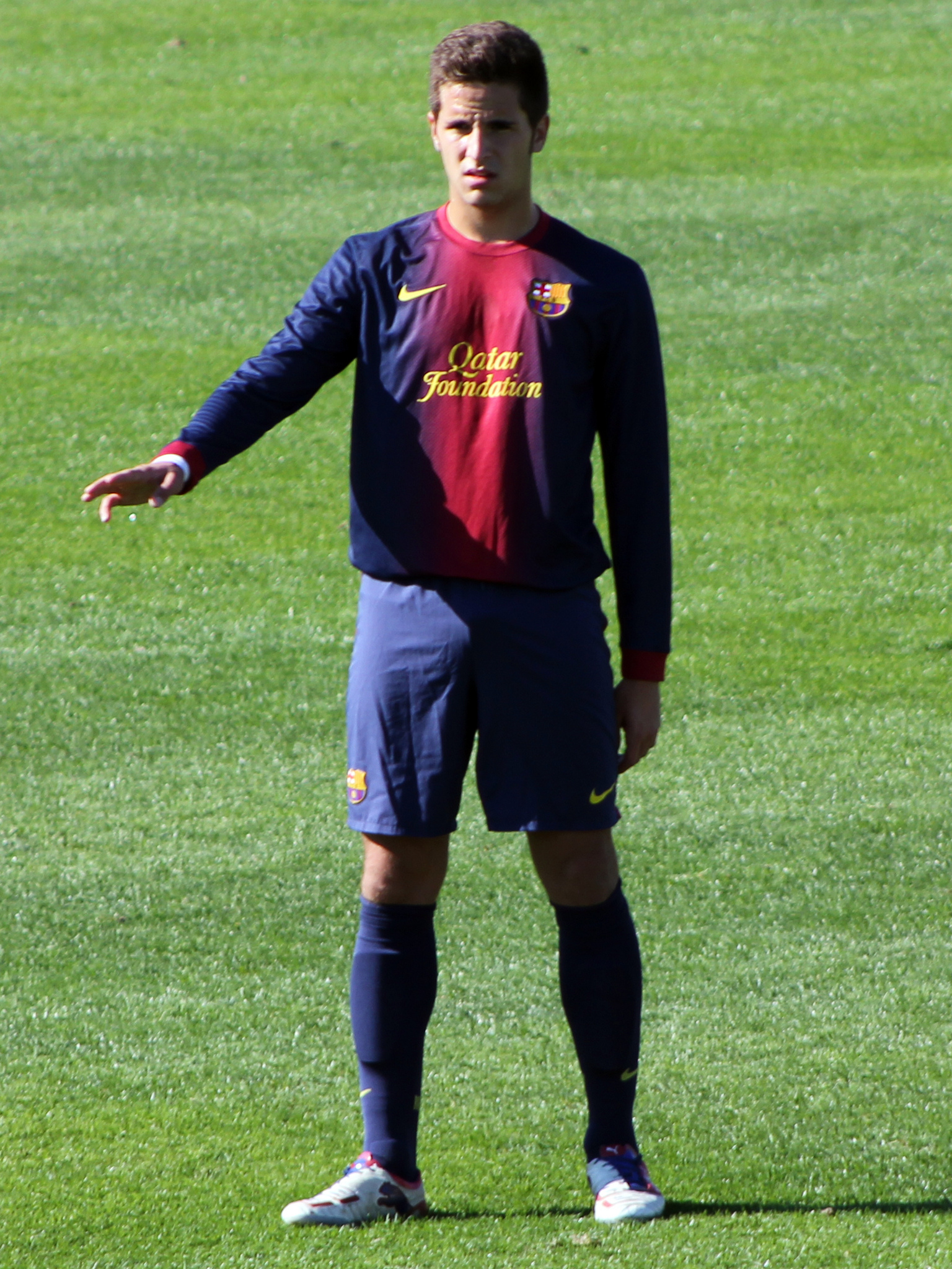 Foto realizada por Javier Segura (@castroquini)